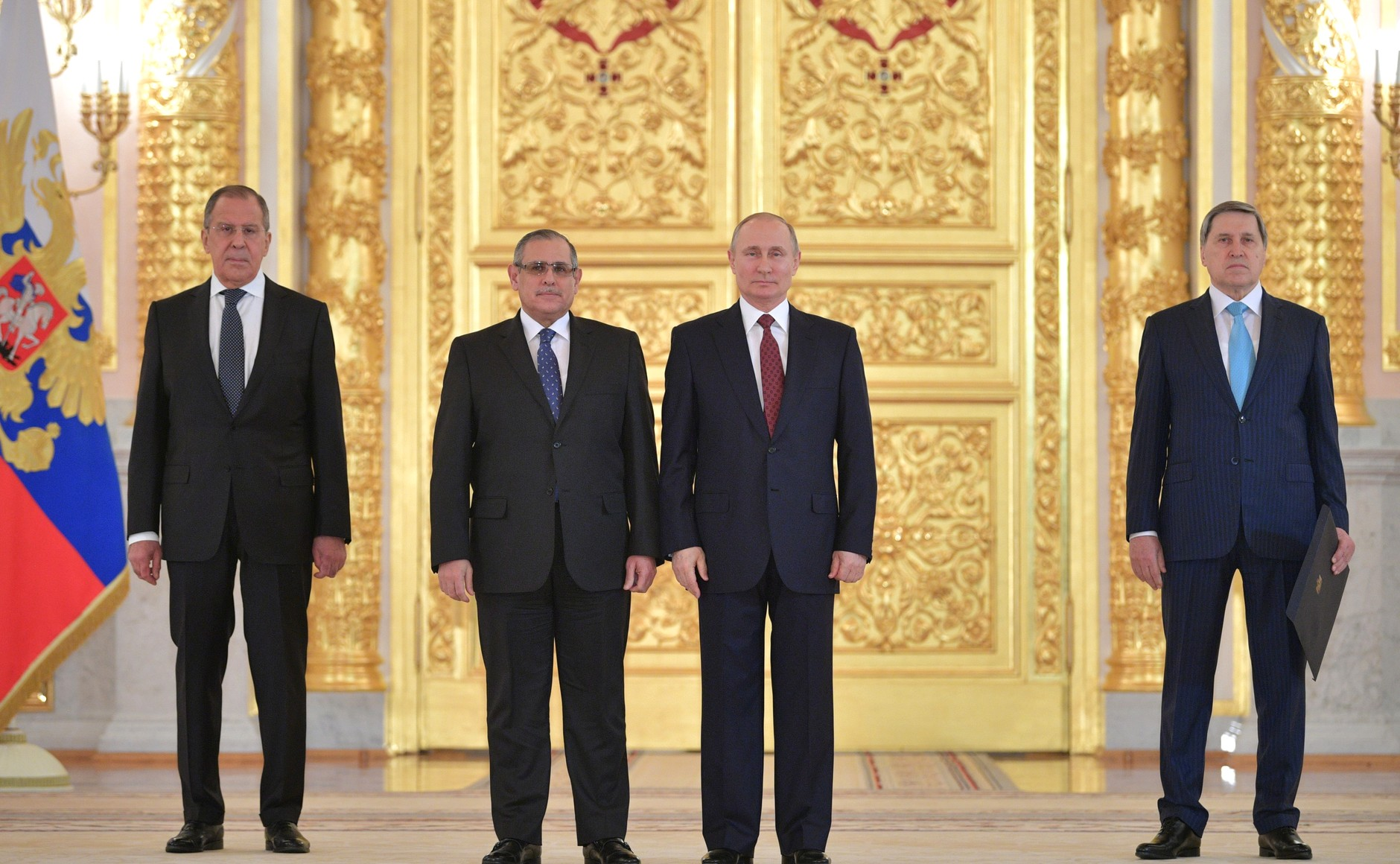 В Александровском зале Большого Кремлёвского дворца Владимир Путин принял верительные грамоты у послов ряда иностранных государств. На церемонии вручения верительных грамот. С Чрезвычайным и Полномочным Послом Арабской Республики Египет в Российской Федерации Ихабом Ахмедом Талаатом Насром.